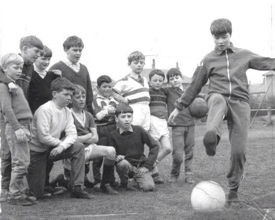 A Stewarton: Rose Reilly che ha 9 anni mostra agli altri bambini quello che sa fare con un pallone.